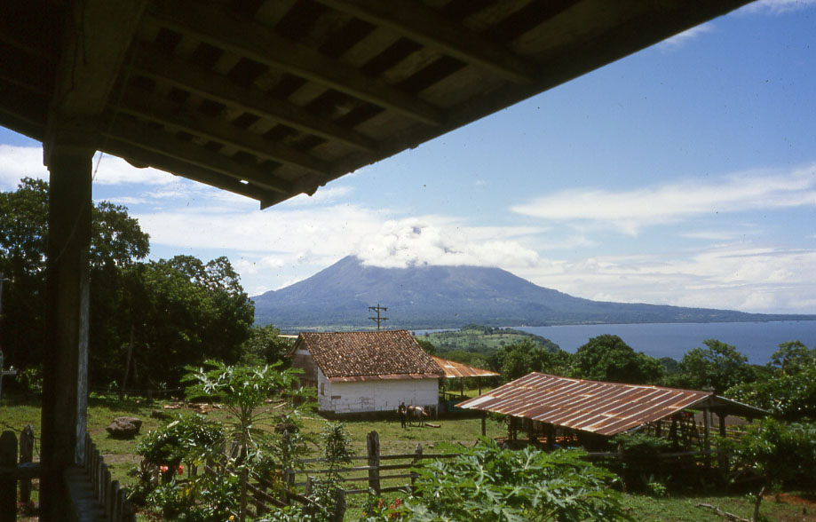 Vista del Volcán COncepción desde la Finca Magdalena (Ometepe) 2002